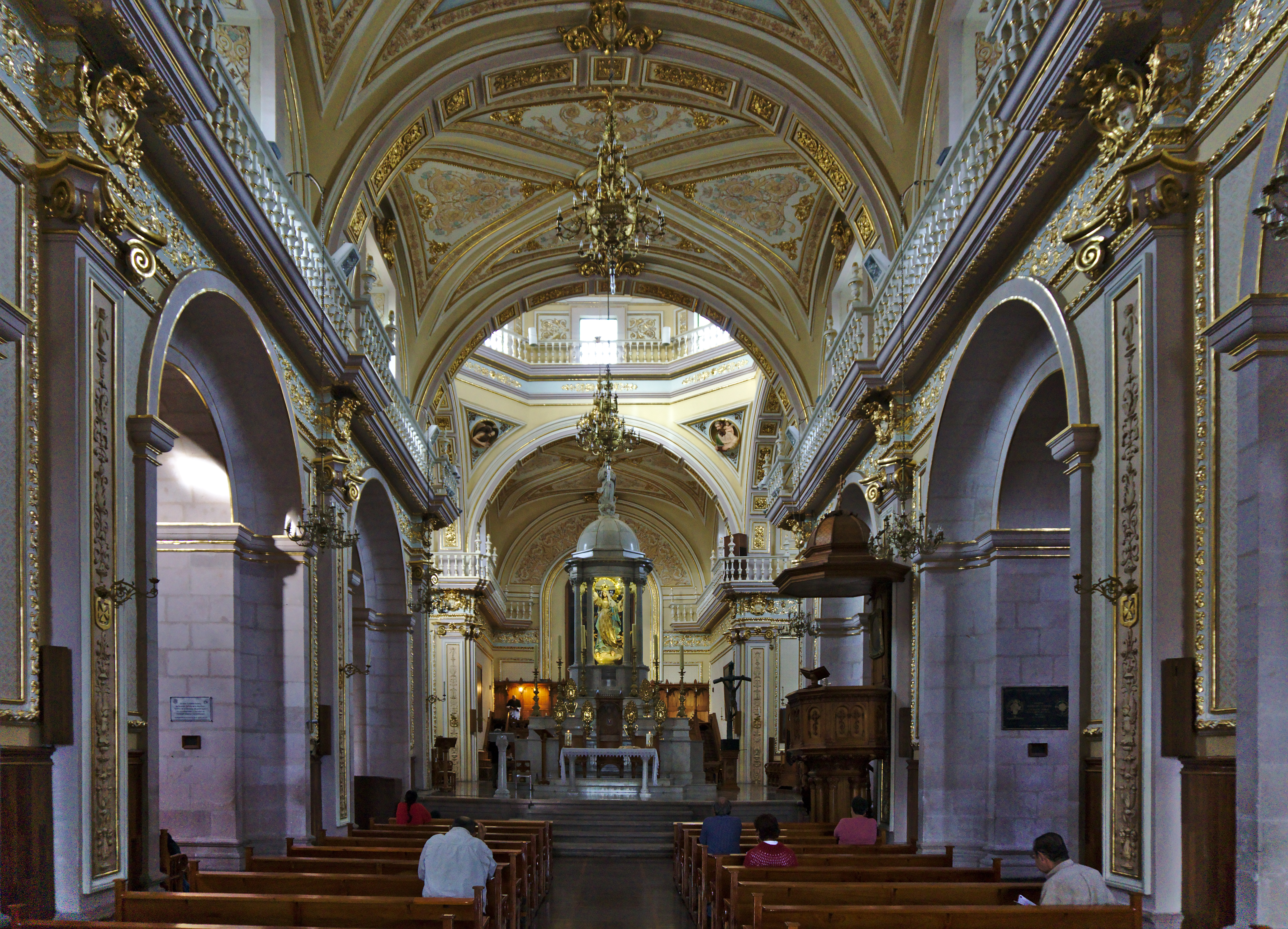 Interior de la Catedral de Aguascalientes, México